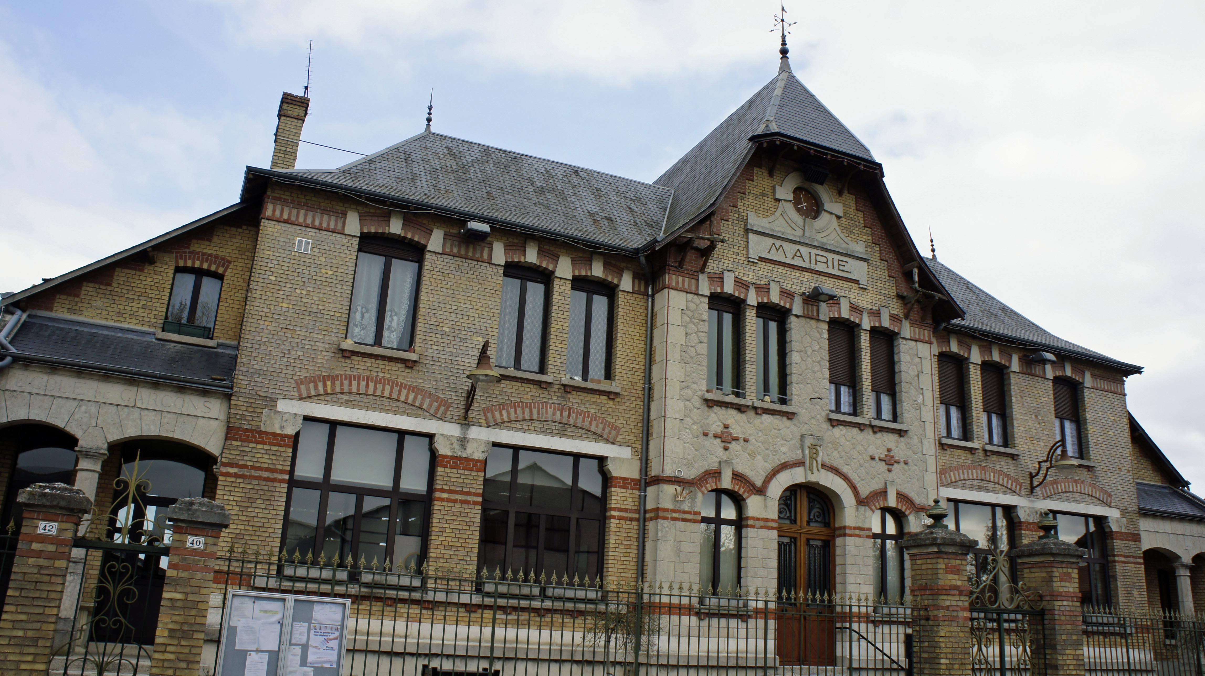 Maire d'Acy Romance.